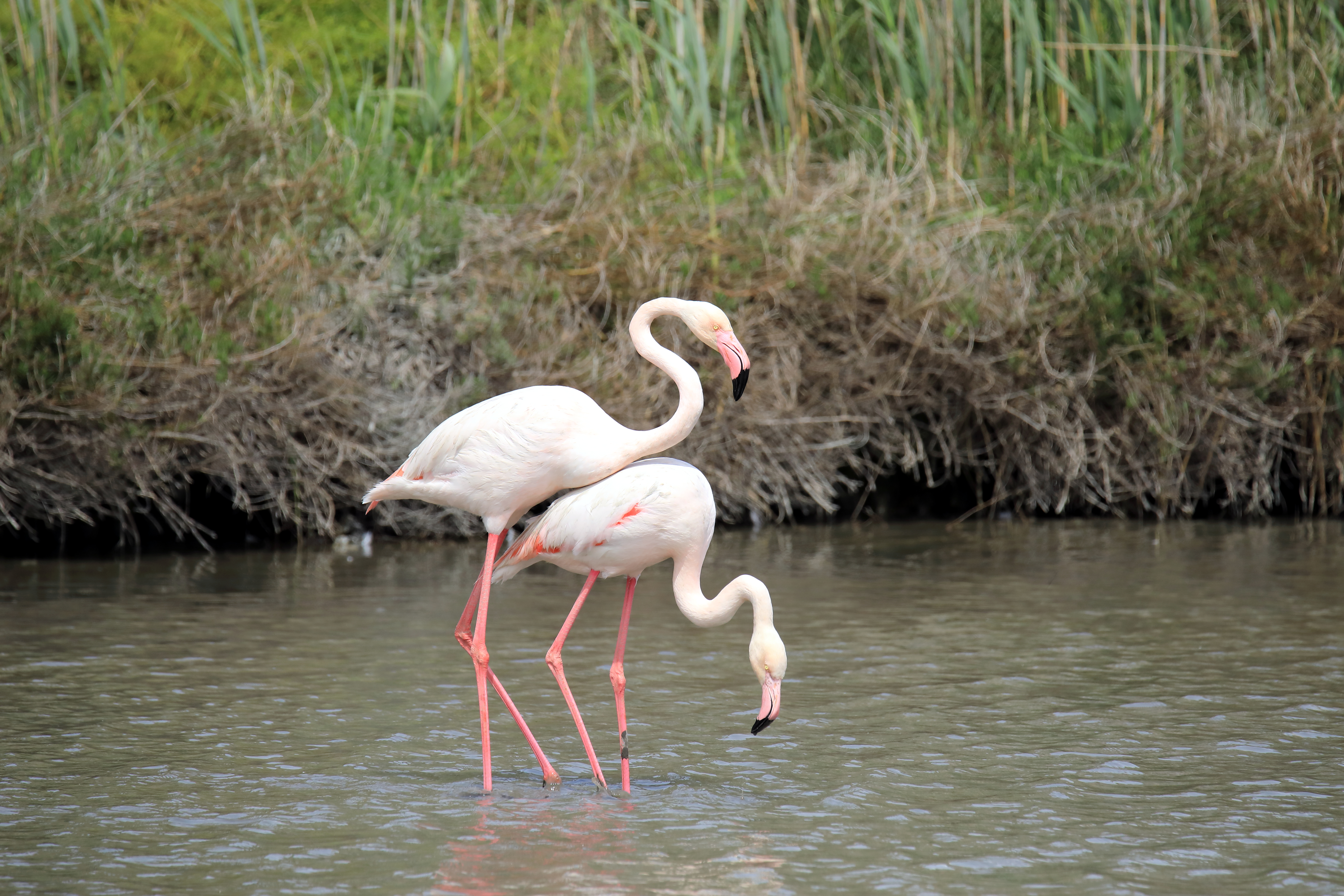 20170425 131 Camargue Flamingo